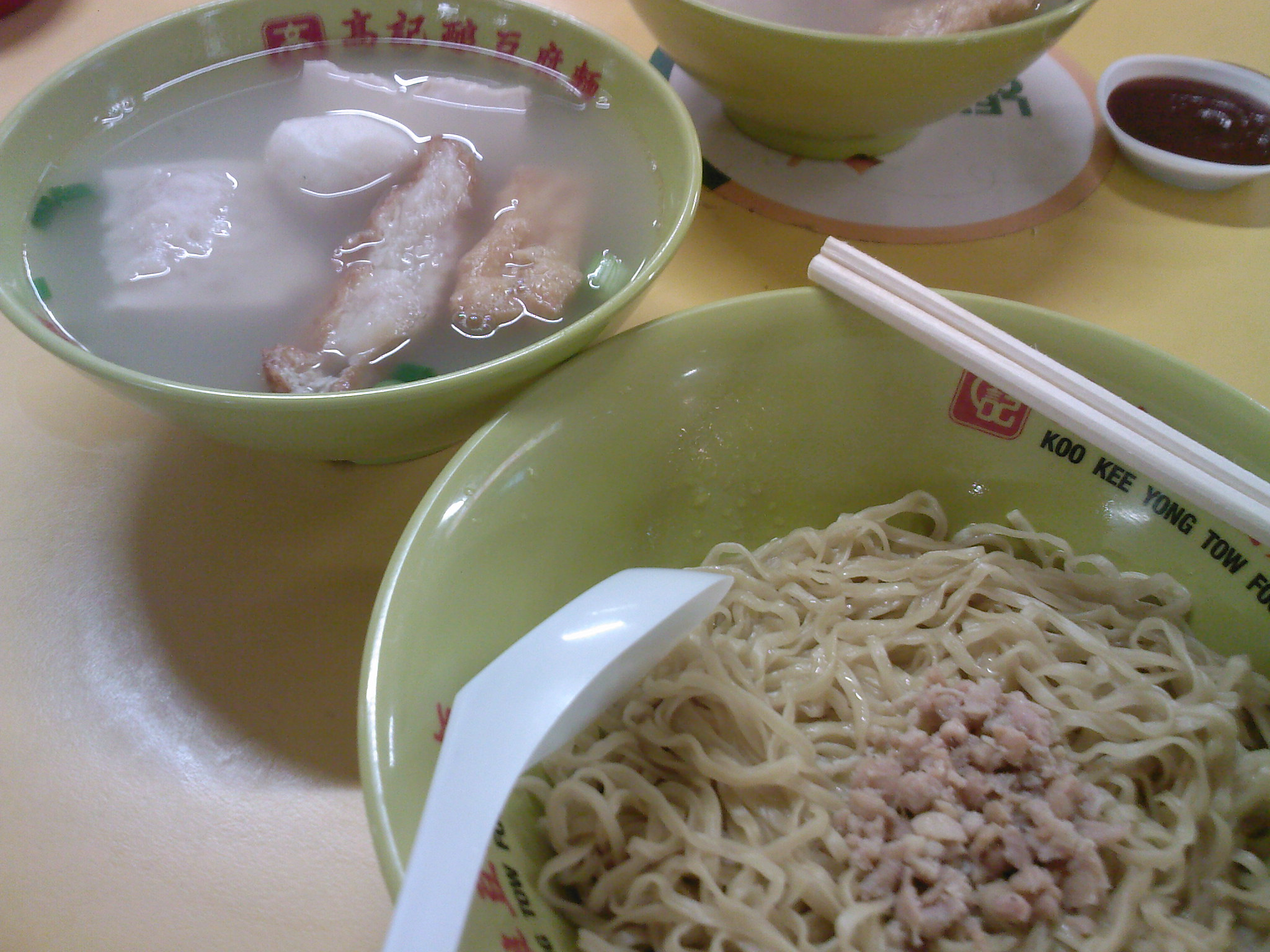 Yong Tau Foo